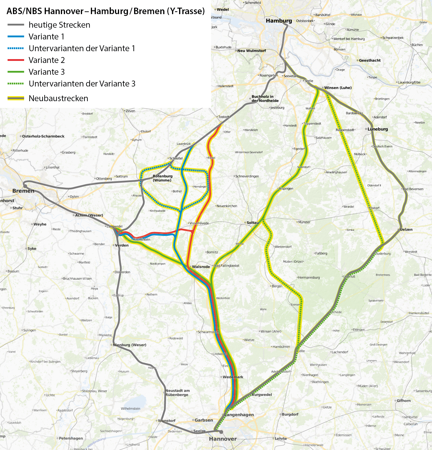 Karte der geplanten ABS/NBS Hannover – Hamburg / Bremen (Y-Trasse) mit Planungsvarianten